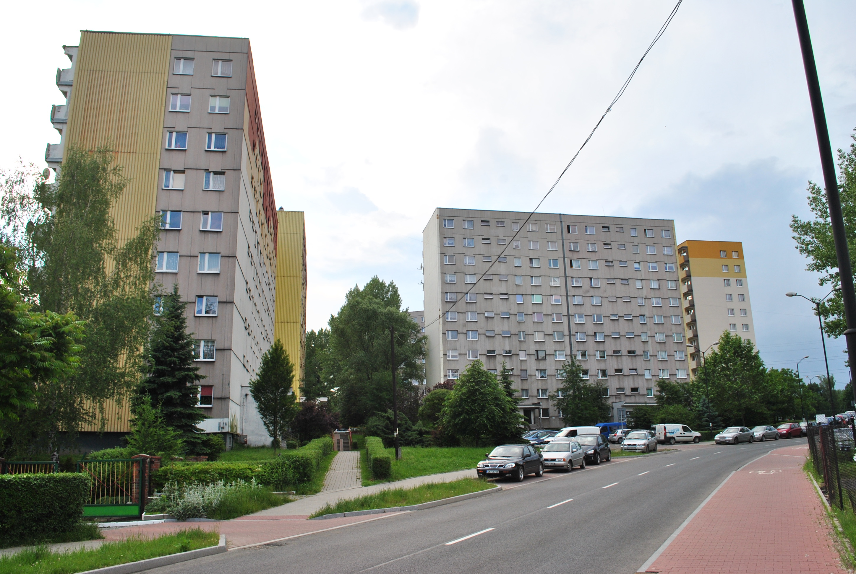 Katowice - Osiedle Witosa. Bloki mieszkalne przy ul. Rataja